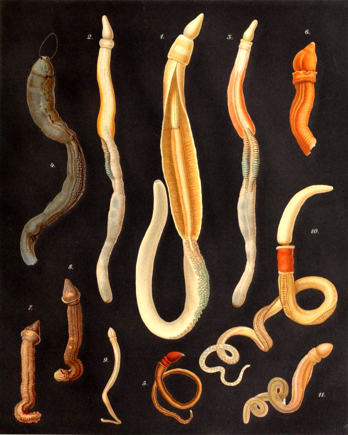 1. Ptychodera clavigera, von der dorsalen Seite. 1 / l . Nach dem Leben. 2. Ptychodera minuta q 1 , von der ventralen Seite. 2 /i- Nach dem Leben. 3. desgl. Q, von der dorsalen Seite. 2 /j. Nach dem Leben. 4. Ptyclwdera erythraea, von der dorsalen Seite. Vi- Nach den vorhandnen Bruchstücken des einzigen, in Spiritus conservirten Exemplars. 5. ScMzocardium brasiliense, von der Seite. Nach dem Leben. 6. Glandiceps talaboti. Vorderkörper, von der dorsalen Seite, '/i* Nach dem Leben. 7. Glandiceps haeksi, erwachsen, Vorderkörper von der ventralen Seite. Vi- Nach dem mir vor- liegenden Spiritus -Exemplar. 8. Dasselbe Exemplar von der dorsalen Seite. 9. Junges Individuum derselben Art. 2 /i- Nach einem Spiritus -Exemplar. 10. Balanoglossus Jcoicalevskii. 4 /i- Nach dem Leben. 11. Balanioglossus hupfferi. i / i . Nach dem Leben. Die Originale zu Fig. 2, 3, 4, 7, 8 sind von Herrn O. Peters in Göttingen, zu Fig. 5 von Herrn Prof. E. Selenka in Erlangen, zu Fig. 6 von Herrn Merculiako in Neapel, zu Fig. 10 von Herrn Prof. Charles S. Minot in Boston, zu Fig. 1, 9 und 11 von mir angefertigt.